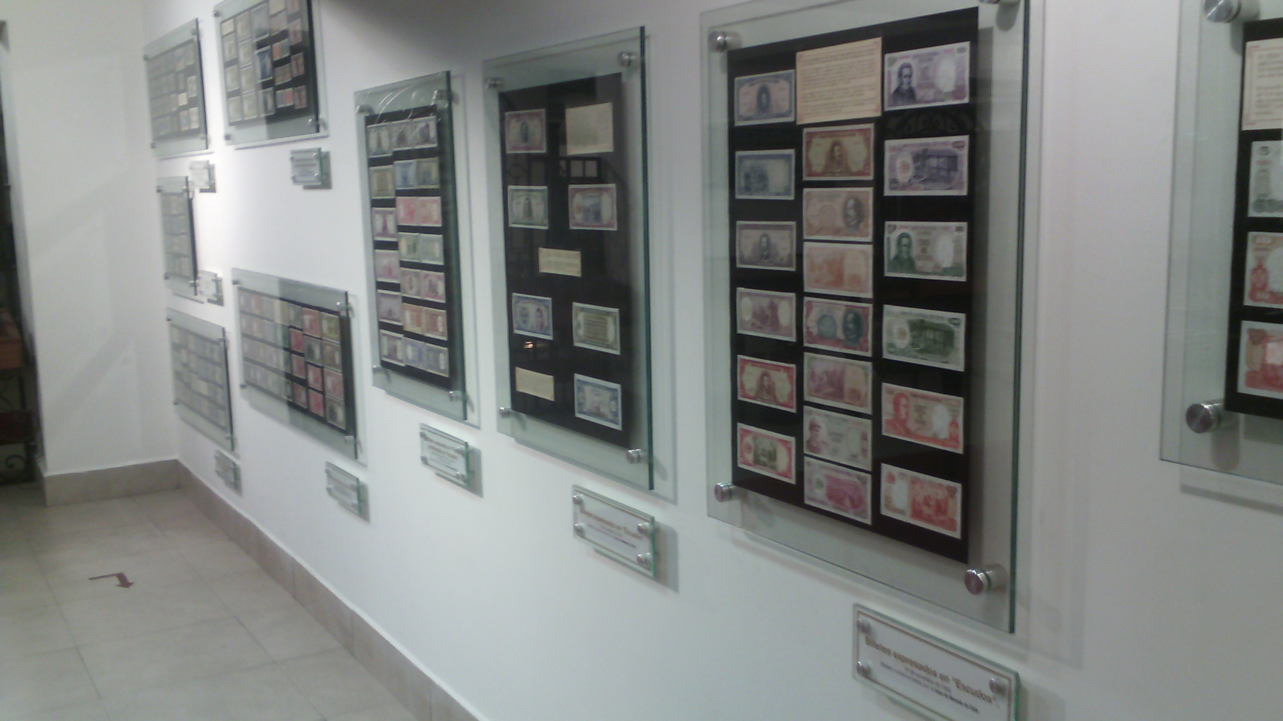 Exposición de billetes utilizados en Chile